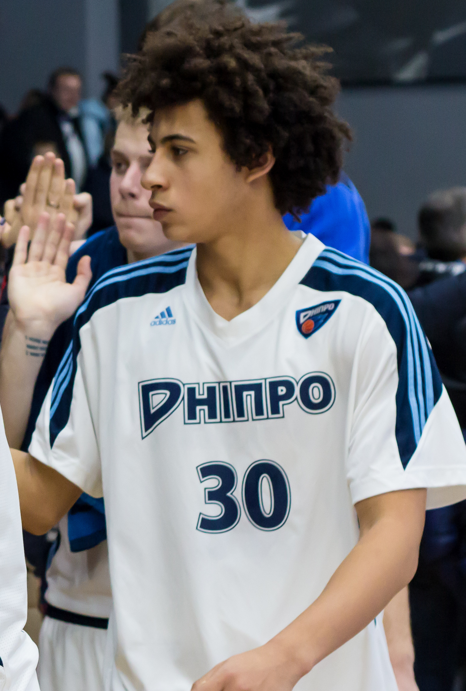 DniproZOG101217-189